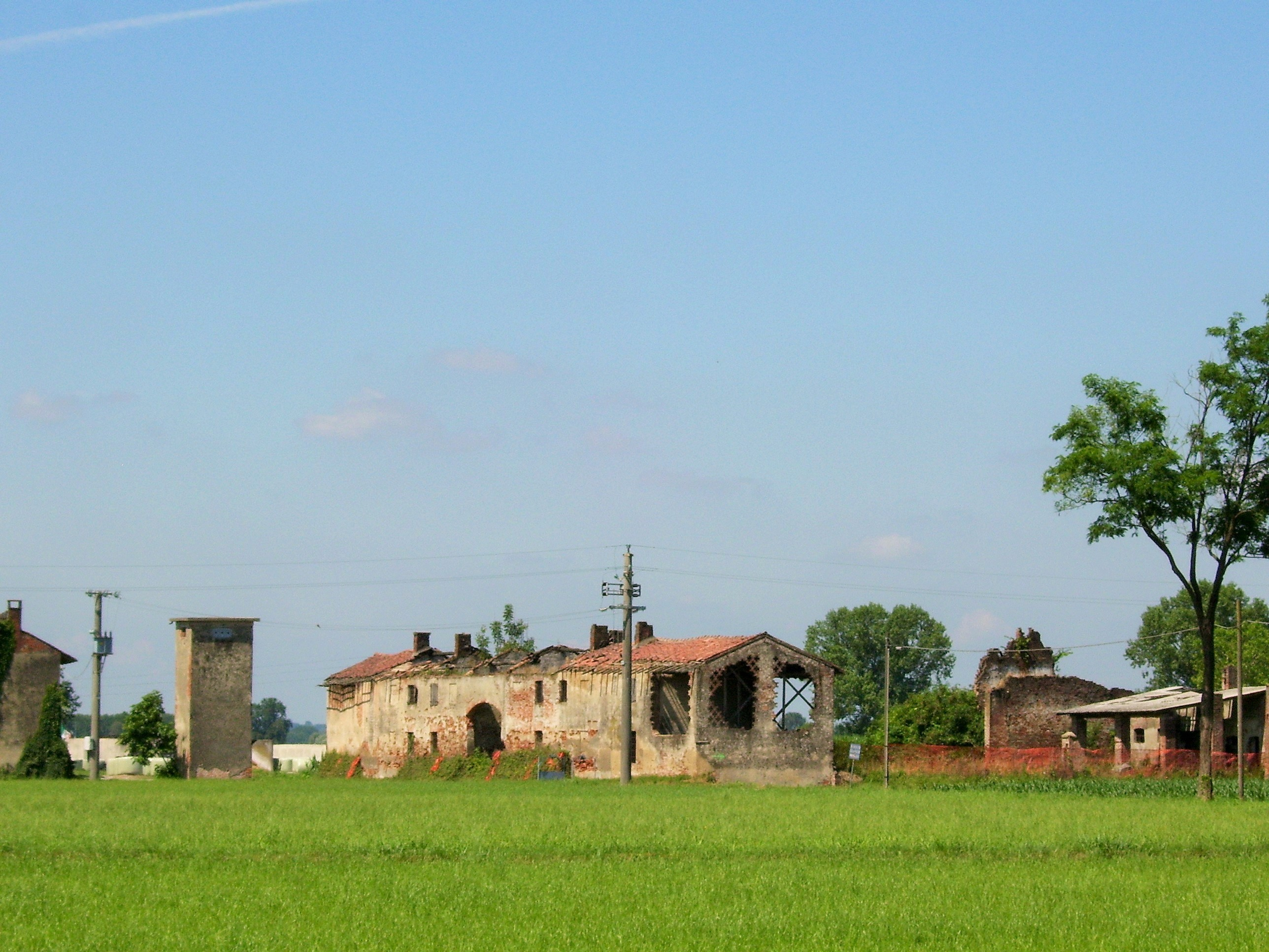 Brembio. Cà del Bosco.